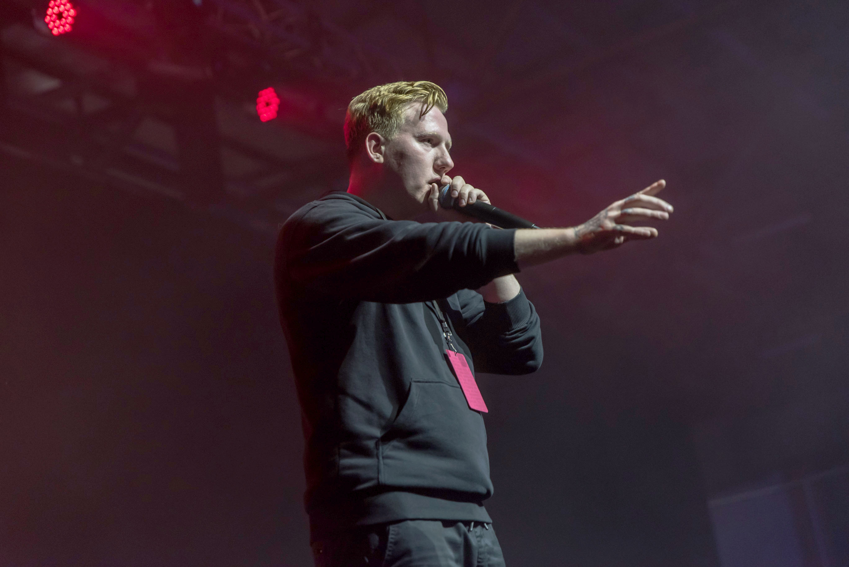 DK на Видфест 2018 в Москве